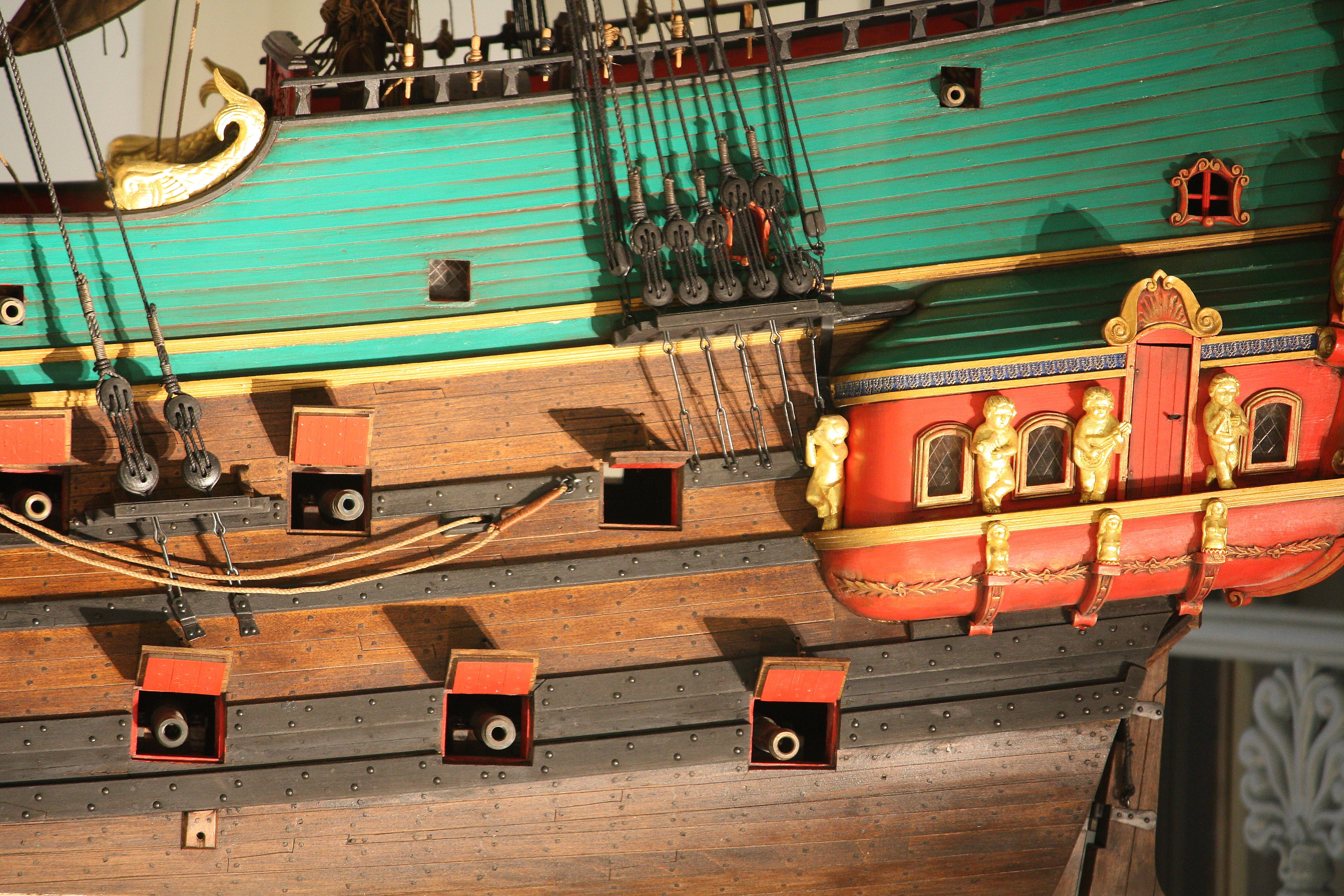 Modell des hamburgischen Konvoyschiffes Wapen von Hamburg (I) - Detailansicht Seitengalerie